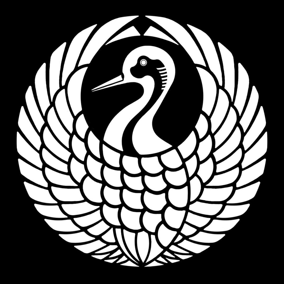 「鶴の丸」紋（染抜）